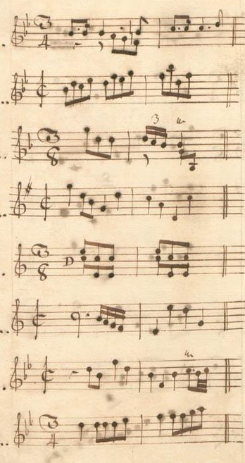 Table du volume XV des manuscrits de Parme (incipit des sonates 31 à 38, K. 544 à 551).